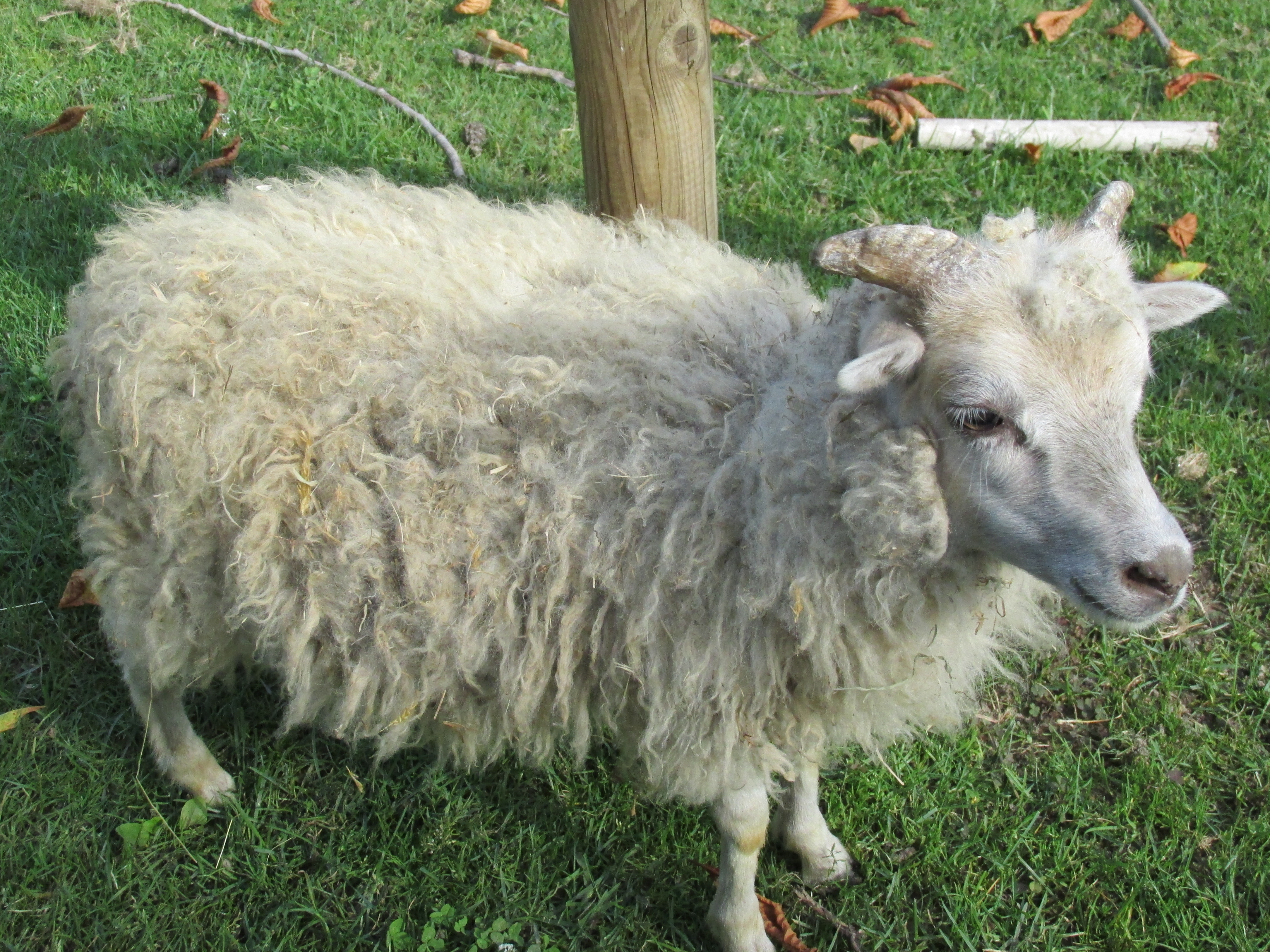 Flokati